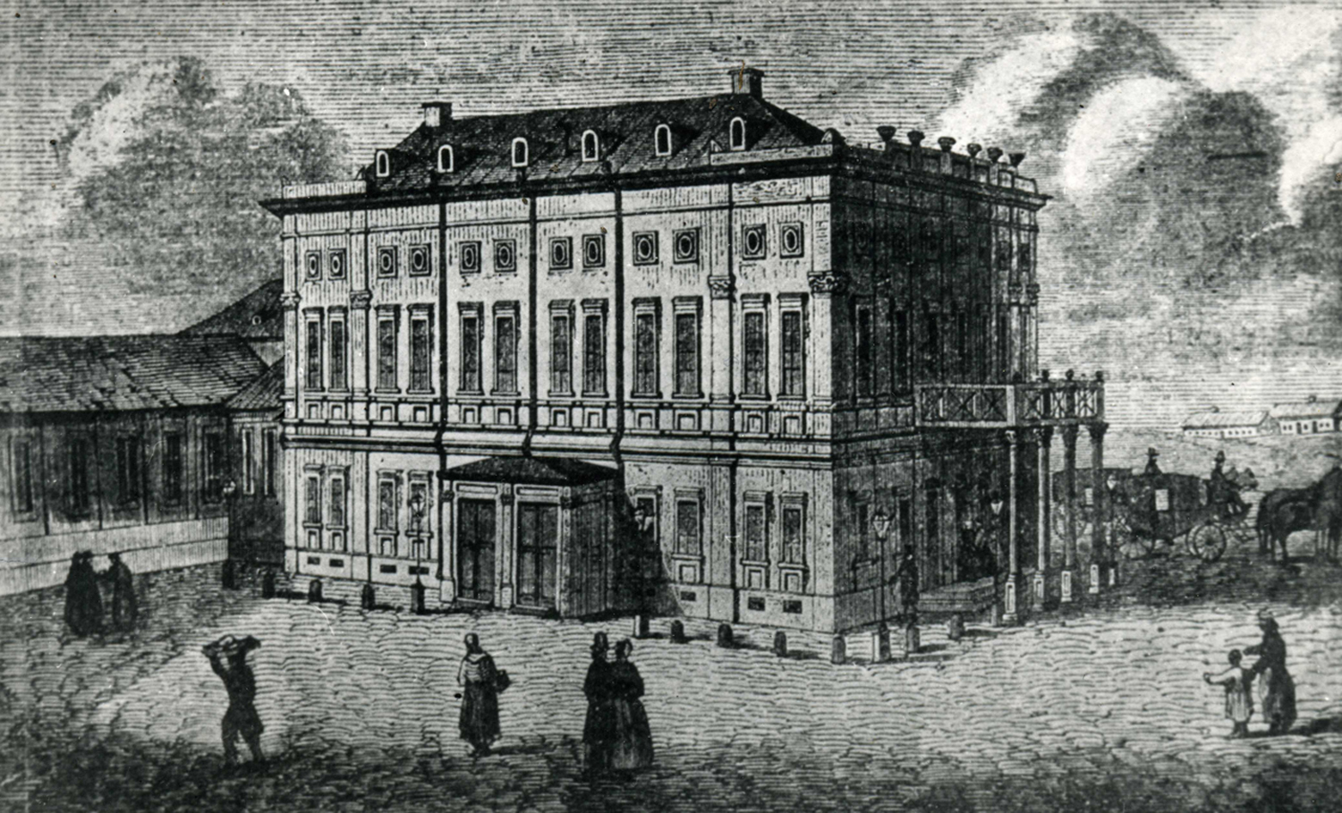 Городской театр в Киеве (второй, 1856—1896), рисунок неизвестного автора